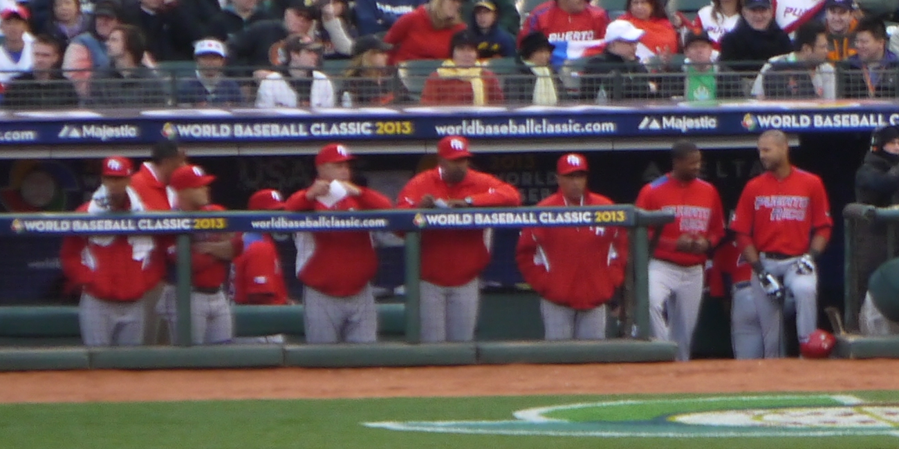 Puerto Rico national baseball team